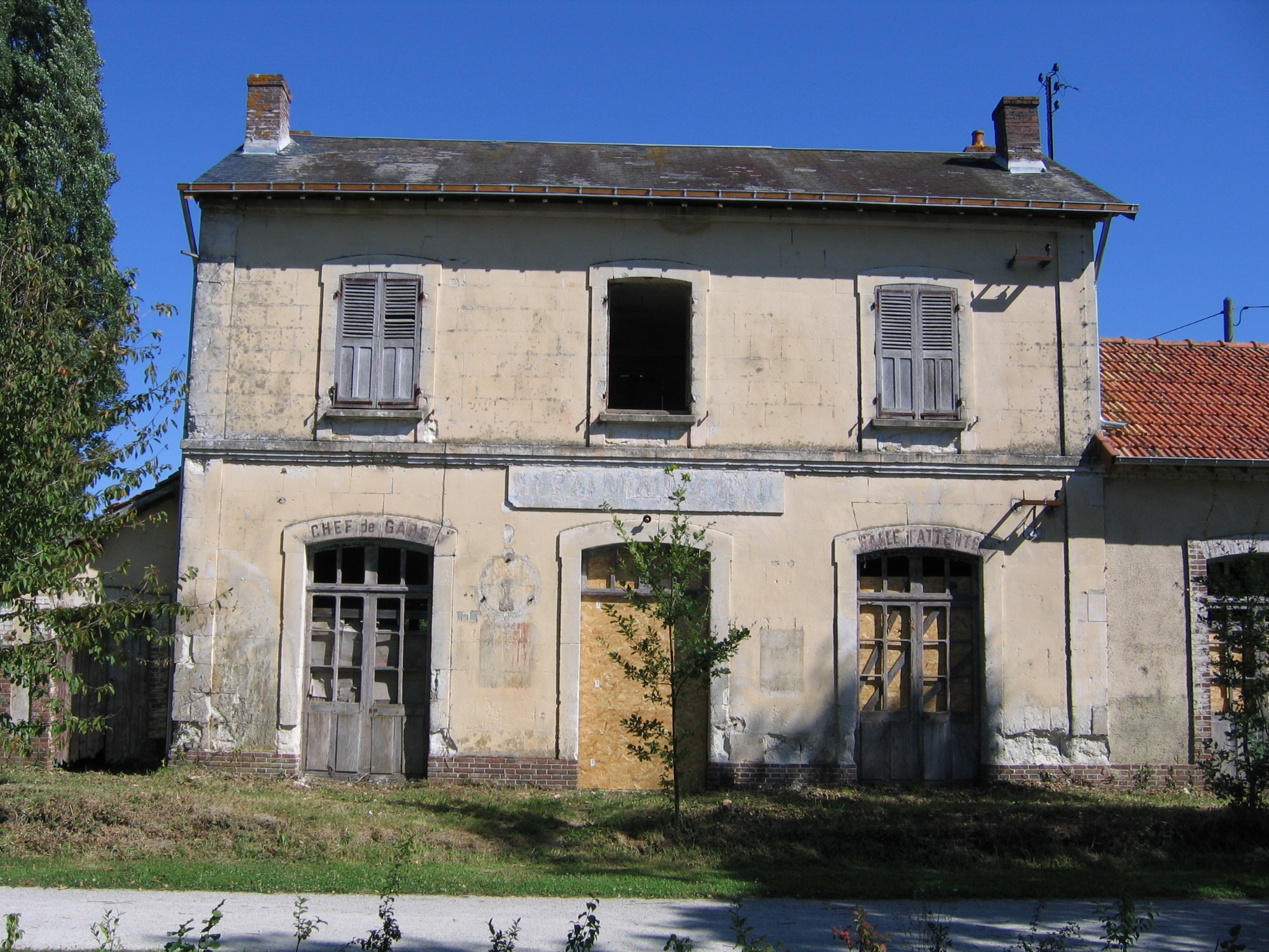 Ancienne gare de Rémalard-Bellou-sur-Huisne (Orne-France), sur la ligne Condé-sur-Huisne/Alençon, désaffectée vers 1970